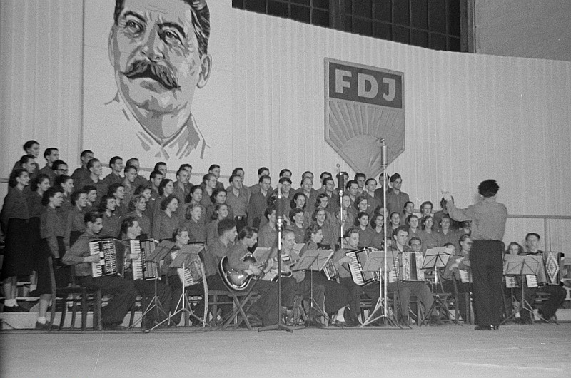 Original image description from the Deutsche FotothekChor der FDJ